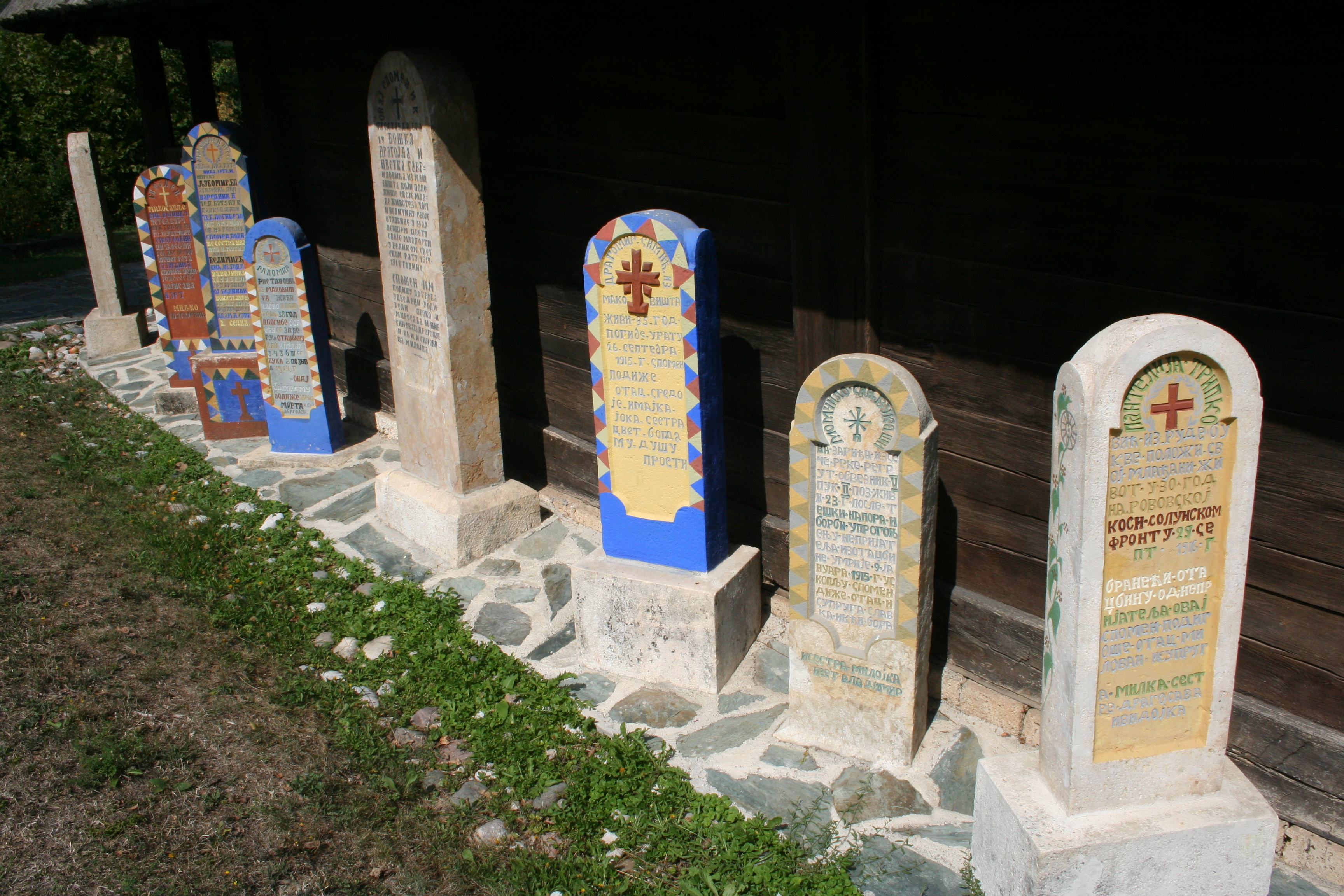 Crkva brvnara Seča Reka